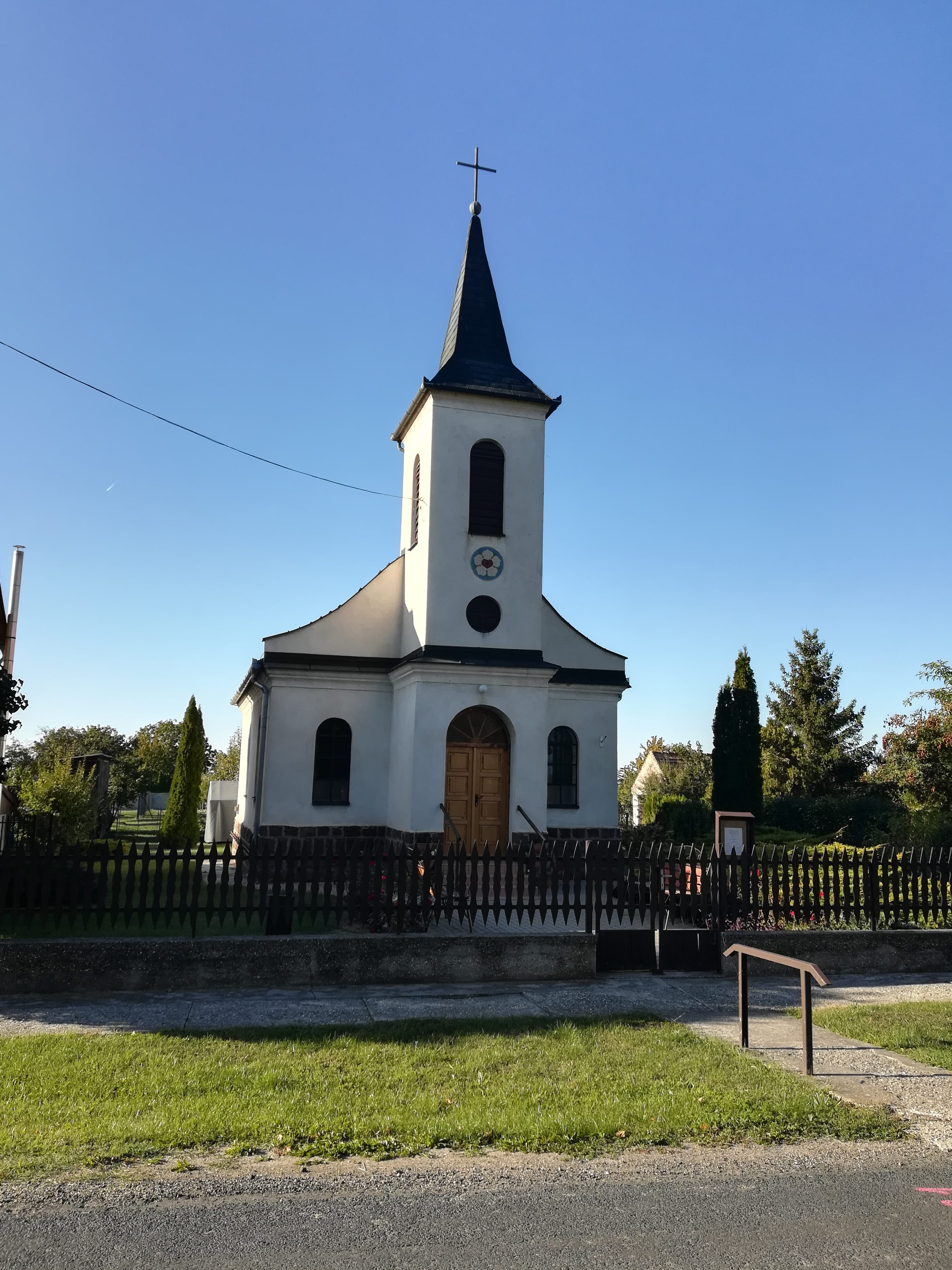 Győrsági evangélikus templom